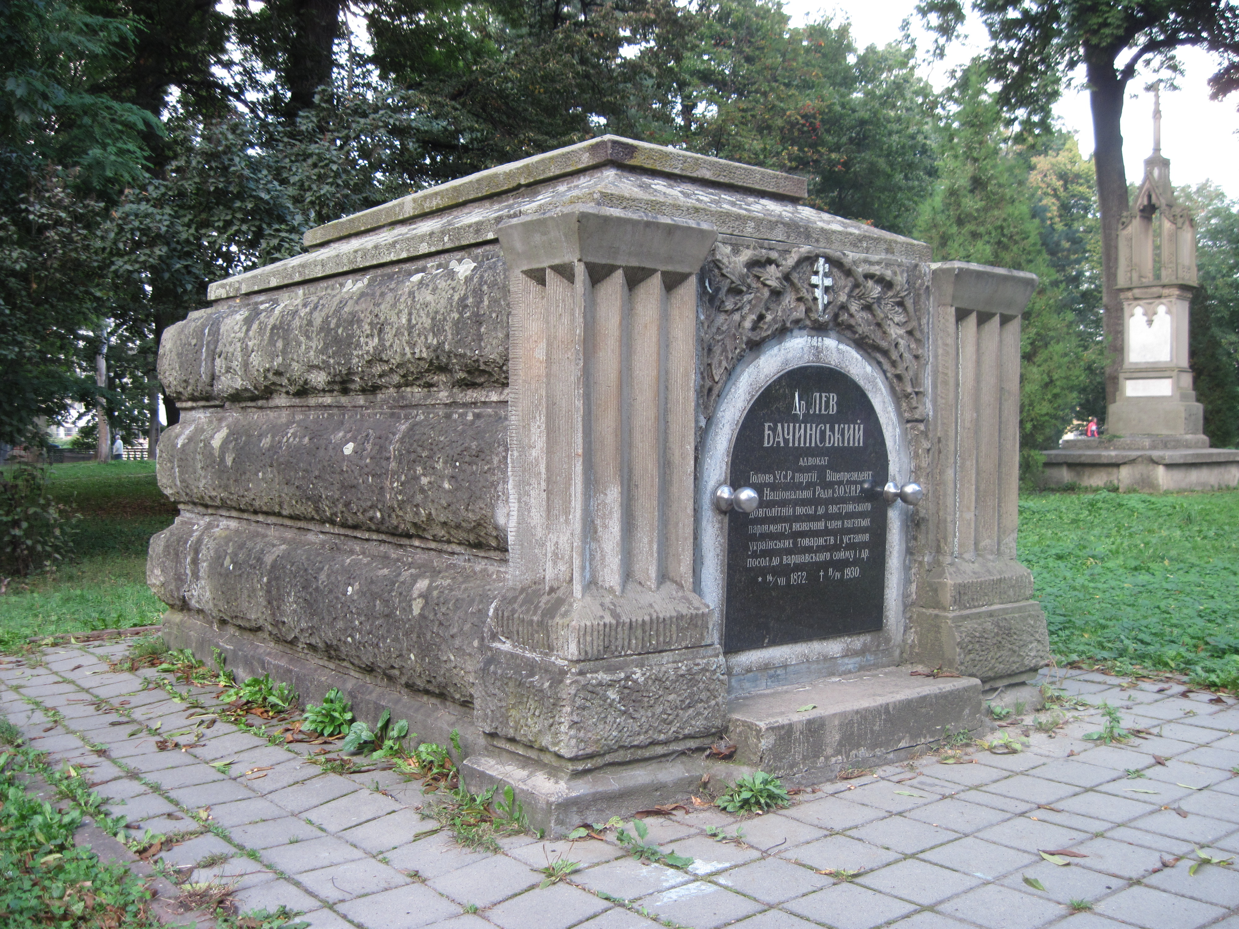 Гробівець доктора Лева Бачинського. Вигляд збоку